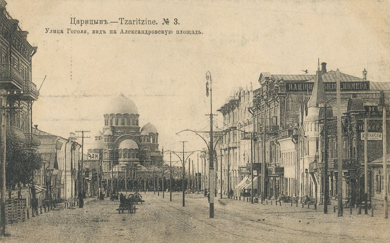 Царицын Александровская площадь